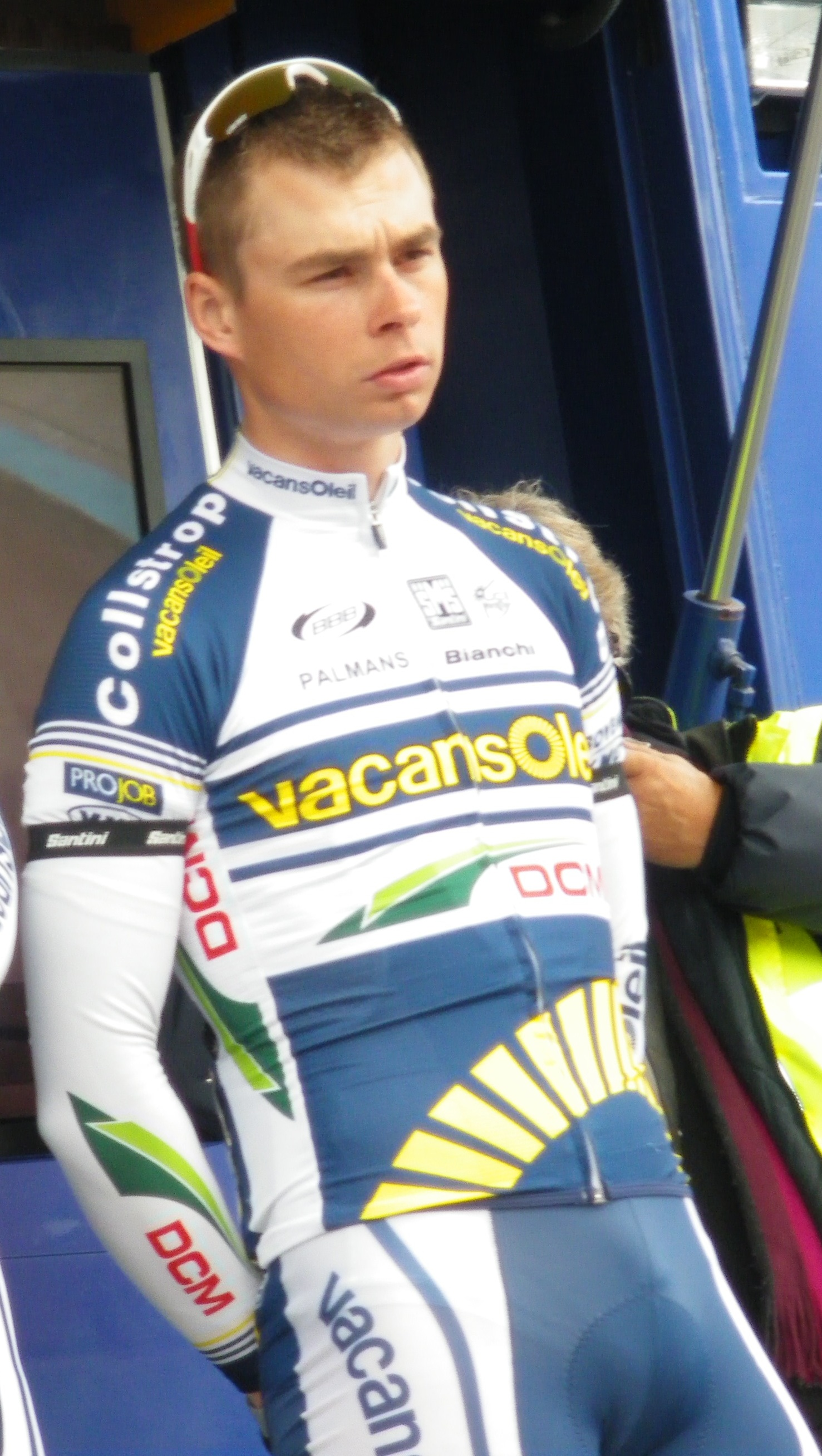 Présentation des coureurs au départ de la dernière étape : Bert-Jan Lindeman